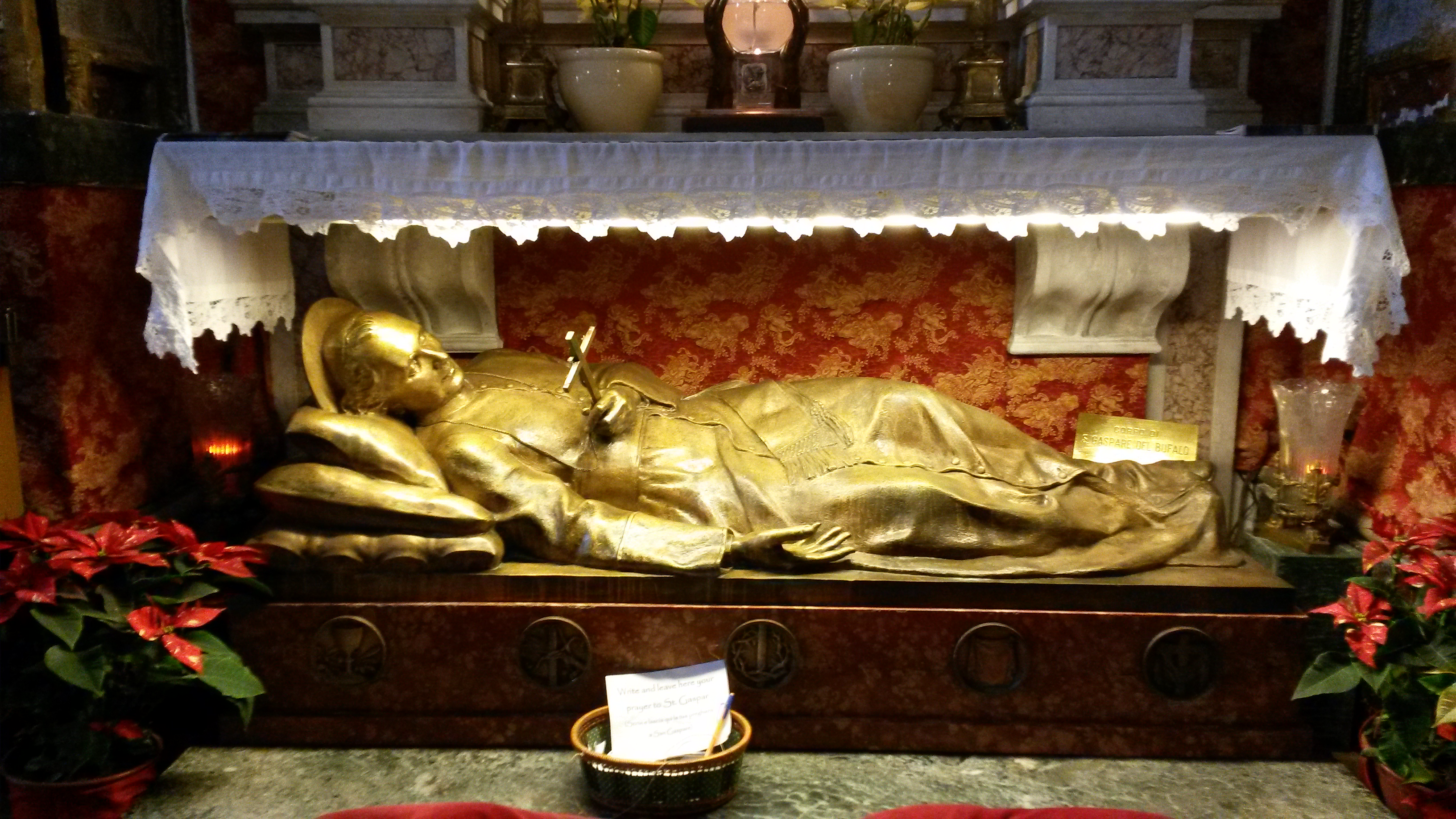 Tumba de San Gaspar del Bufalo en la Iglesia de Santa Maria in Trivio, Roma-Italia.